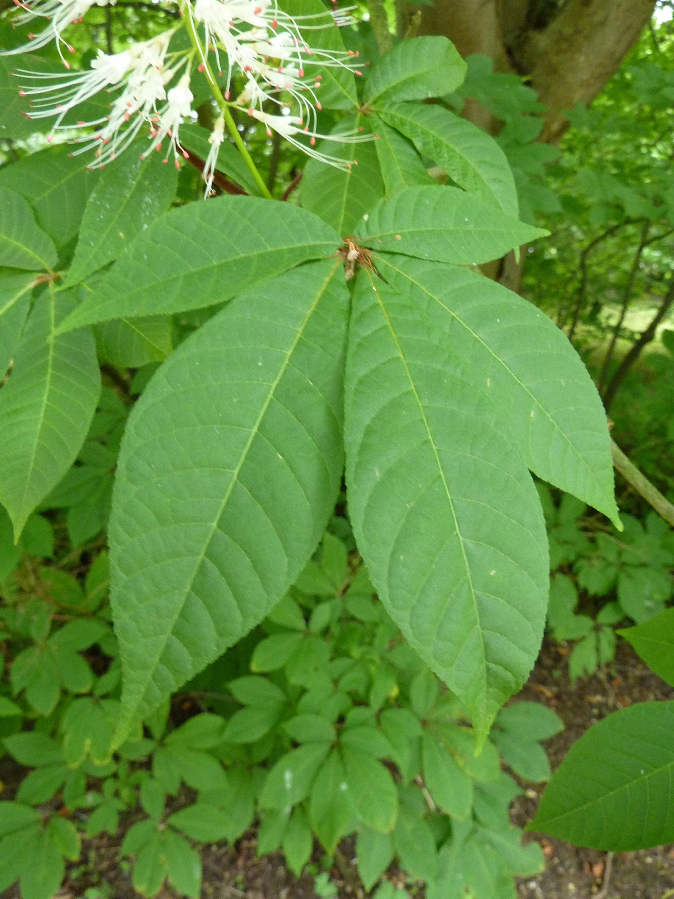 Aesculus parviflora, Cambridge University Botanic Garden